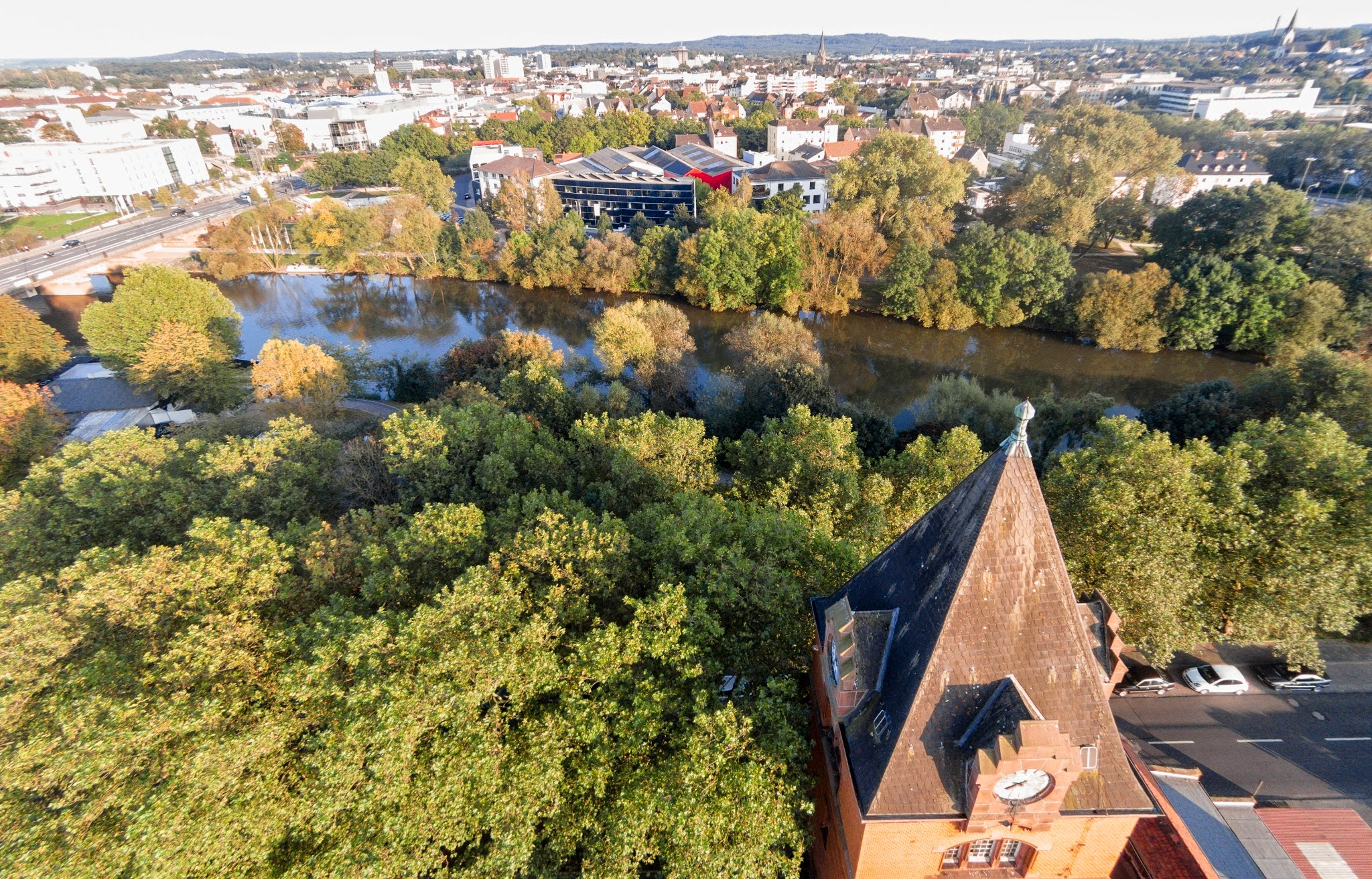 Luftbild vom Gelände Alter Schlachthof in Richtung der Innenstadt in Gießen.